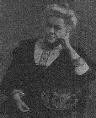 Illustration till artikel i tidningen Dagny om kvinnotidskrifter.